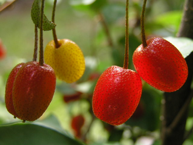 グミの実。 ～photo by Autumn Snake 【おぉたむすねィく探検隊】